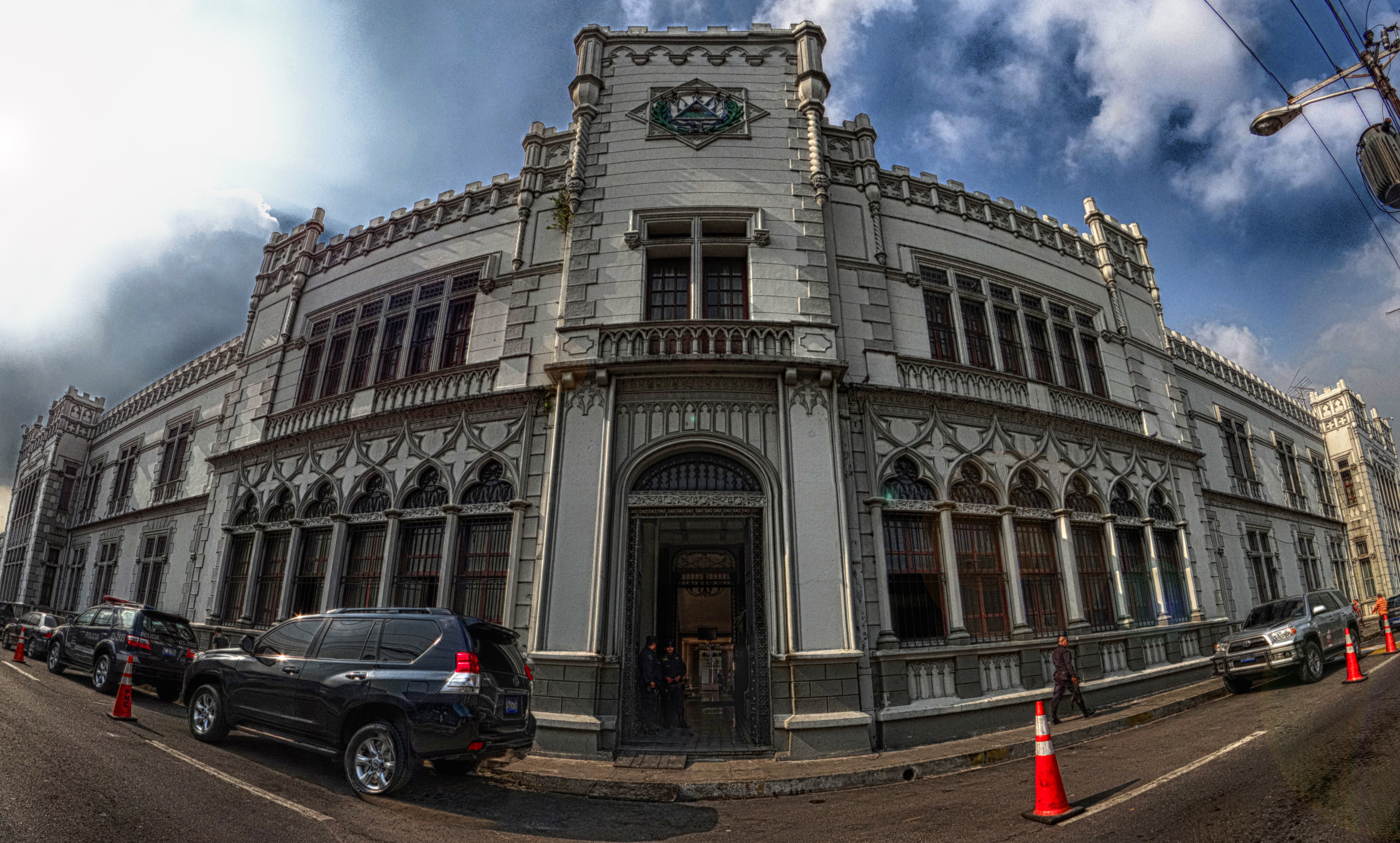 Policía Nacional Civil, Ministerio de Seguridad Pública. (Antiguo Castillo Policía. Nacional)